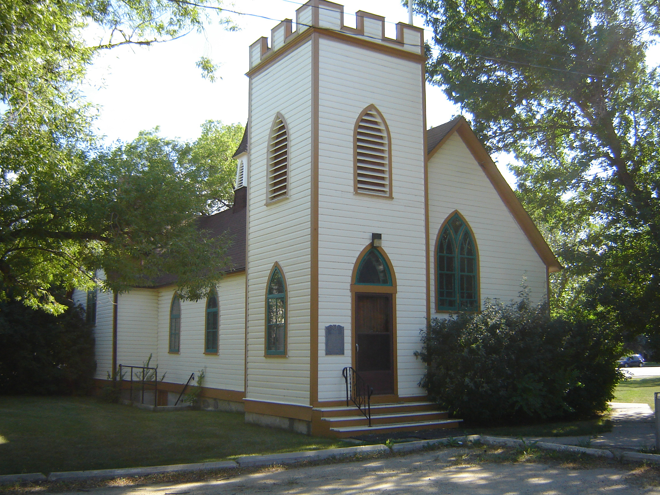 Wikipedia:Rugby Chapel U of S Saskatoon Sasktchewan Canada